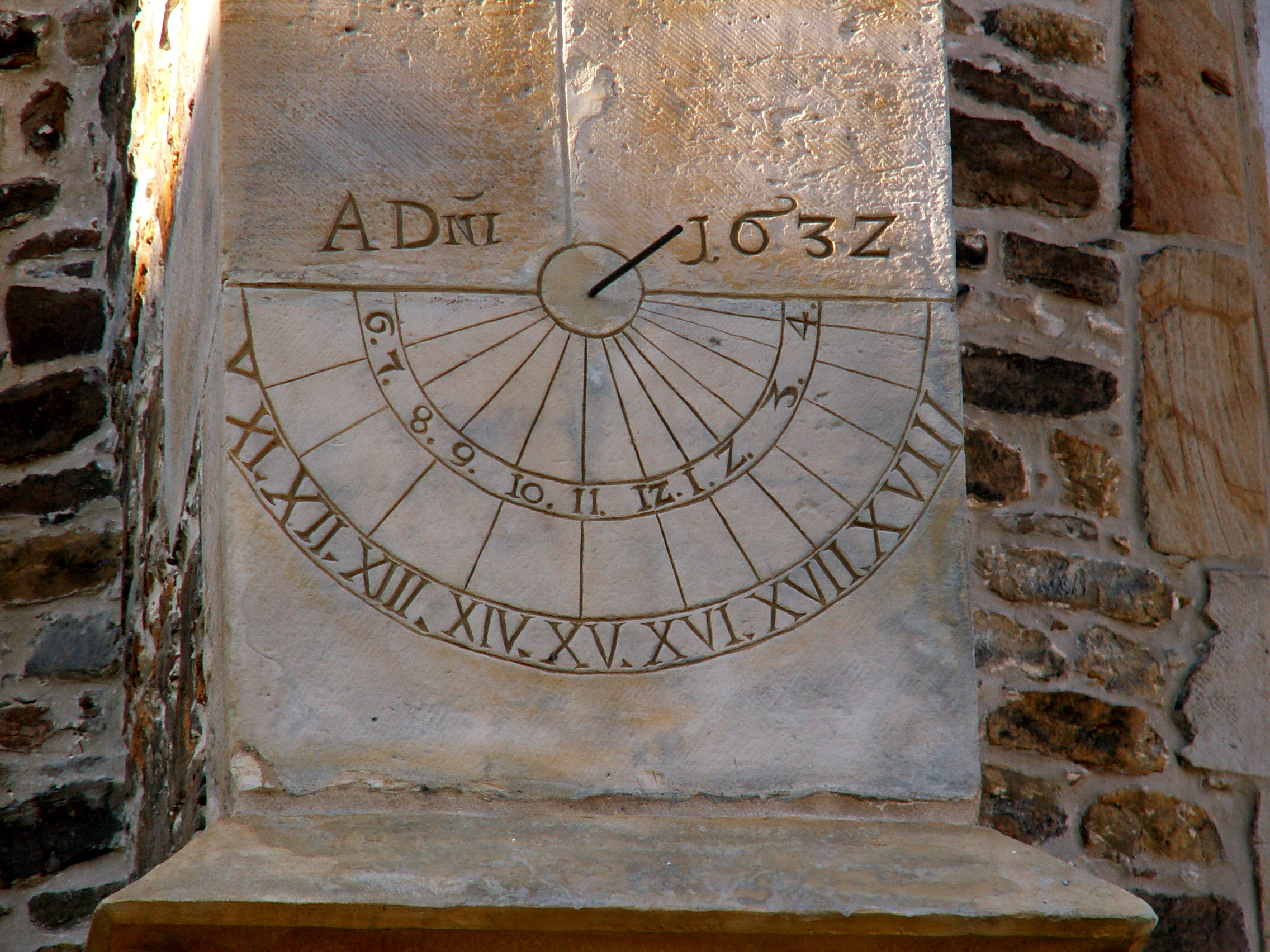 Kościół św. Zygmunta w Szydłowcu